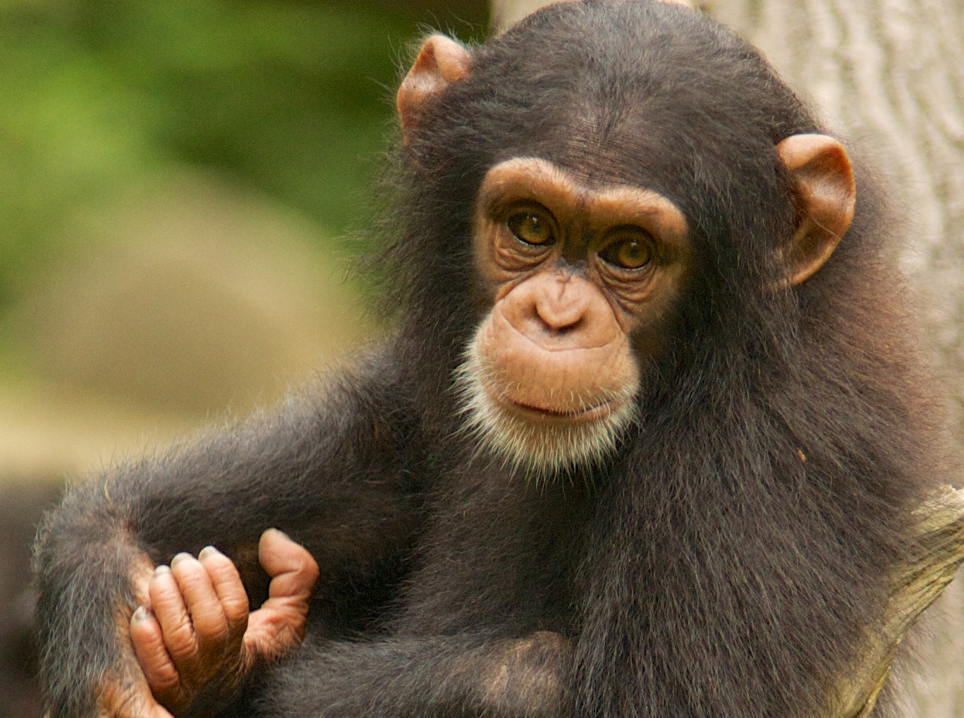 Beautiful Infant Chimpanzee!